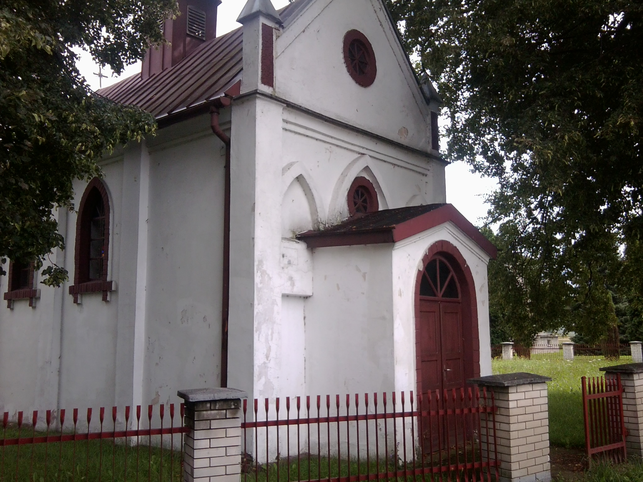 Kaplica św. Franciszka z Asyżu w Podrzeczu (województwo małopolskie)